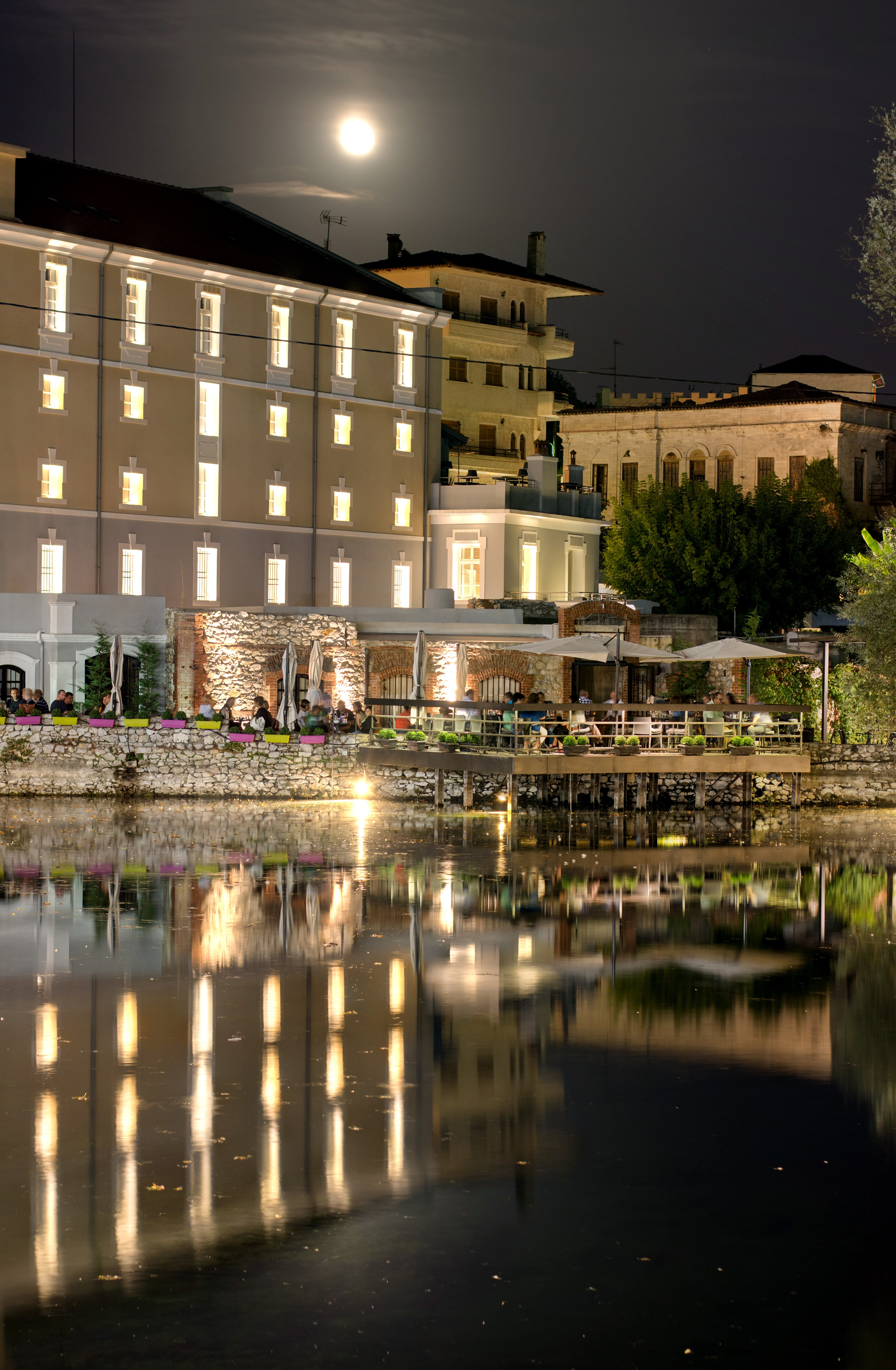 Καπναποθήκη Σπίρερ, Δράμα«Καπναποθήκη Σπίρερ»